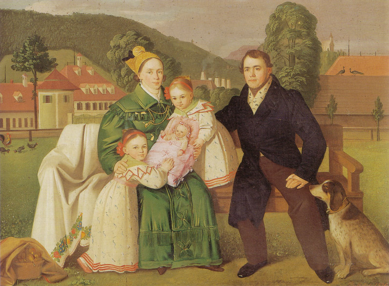 Im Baumgarten des Gradnwerkes mit dem Georgenberg als Hintergrund sowie dem Herrenhaus und der Werkstätte. Dessen Frau Josepha Theresia Zeitlinger, geb. Stainhuber. Im Steckkissen das "Julerl", stehend die Töchter Therese (*5. 3. 1824) und Josefa (*12. 2. 1826).